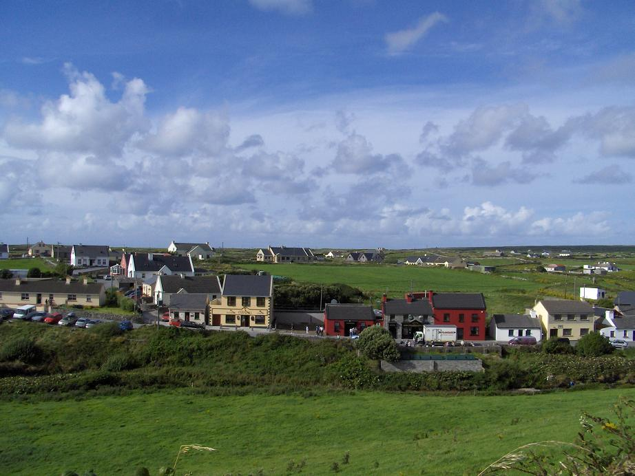 Das ist die Ansicht der Hauptstraße von Doolin wenn man aus Richtung Südwest von den Cliffs of Moher kommt.Folgt man der Straße weiter nach Nordwest kommt nach ca. 1km der kleine HAfen mit den Fähren zu den Aran Islands.Folgt man ihr nach Nordost, so erreicht man bald den Burren.